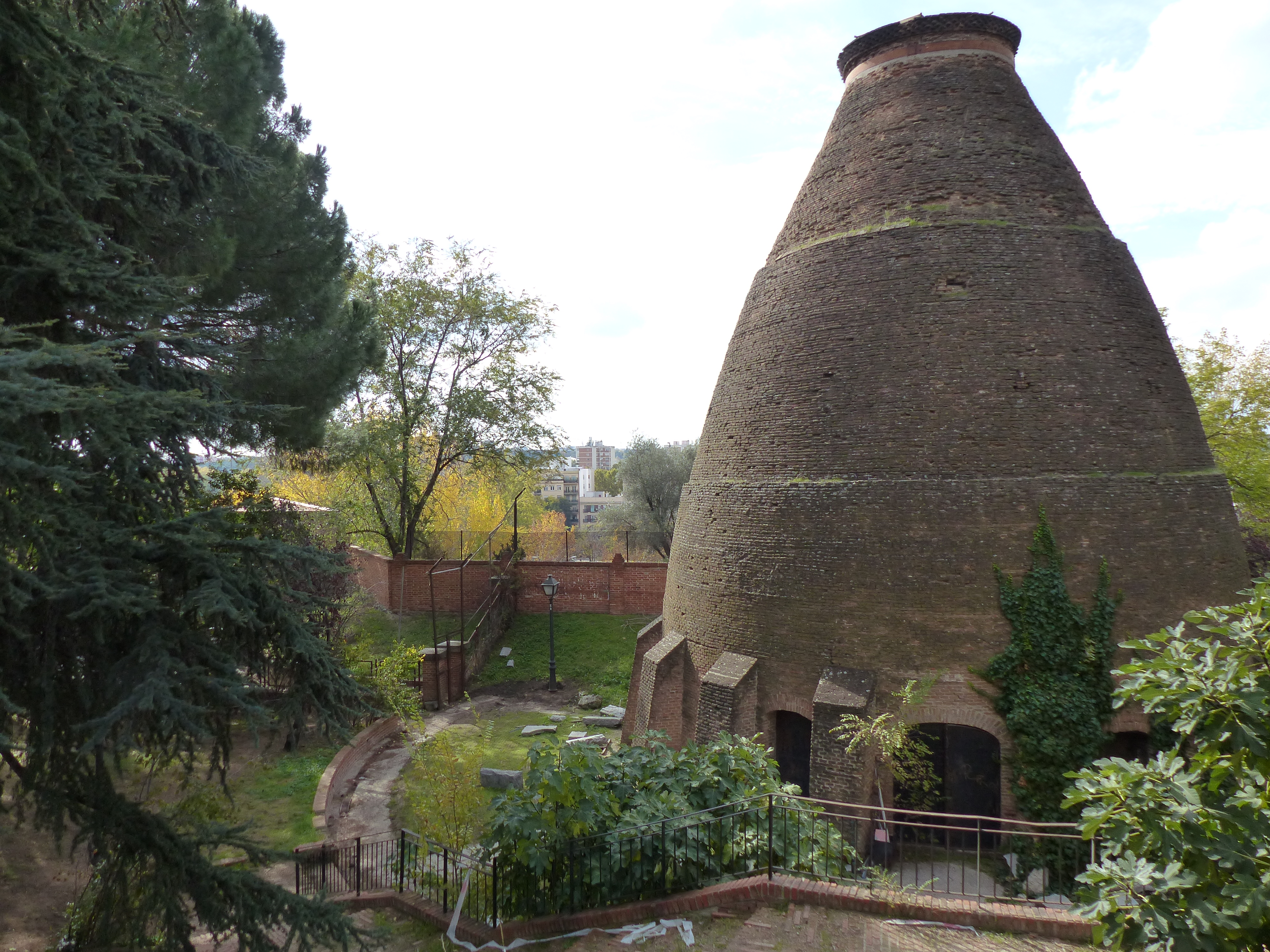 La Tinaja, vissta desde el patio de la vieja escuela, ahora una comisaría de policía.